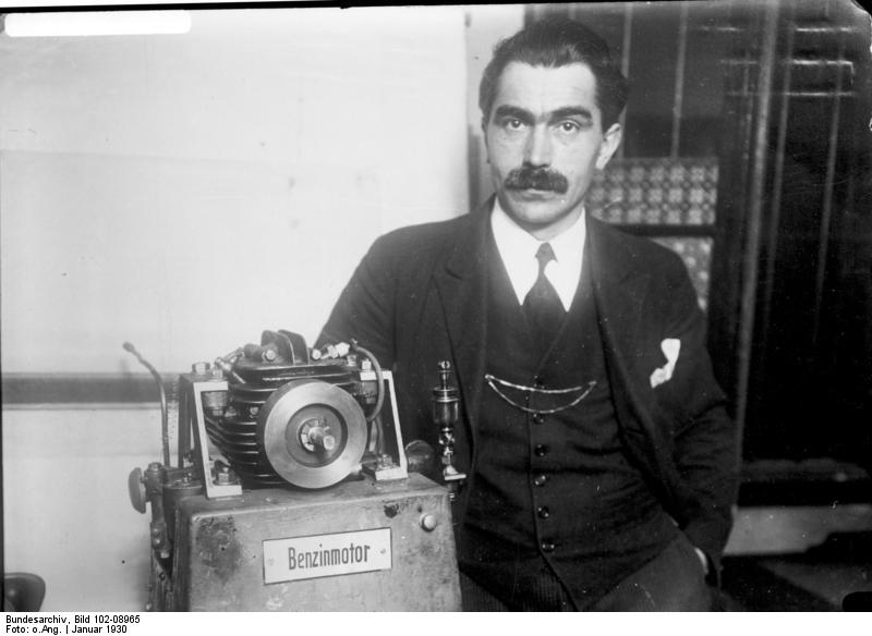 Der kleinste Motor der Welt! Eine Epoche machende Erfindung eines österreichischen Ingenieurs! Der oesterreichische Ingenieur Bernhard construierte einen nur 15 Pfund schweren Motor, welcher imstande ist, 36 P.S. zu leisten. Die Erfindung dürfte auf dem Gebiete des Motorenbaues umwälzend sein. - Der Ing. Bernhard mit seinem, 15 Pfund schweren Motor, welcher eine Leistung von 36 P.S. hat.